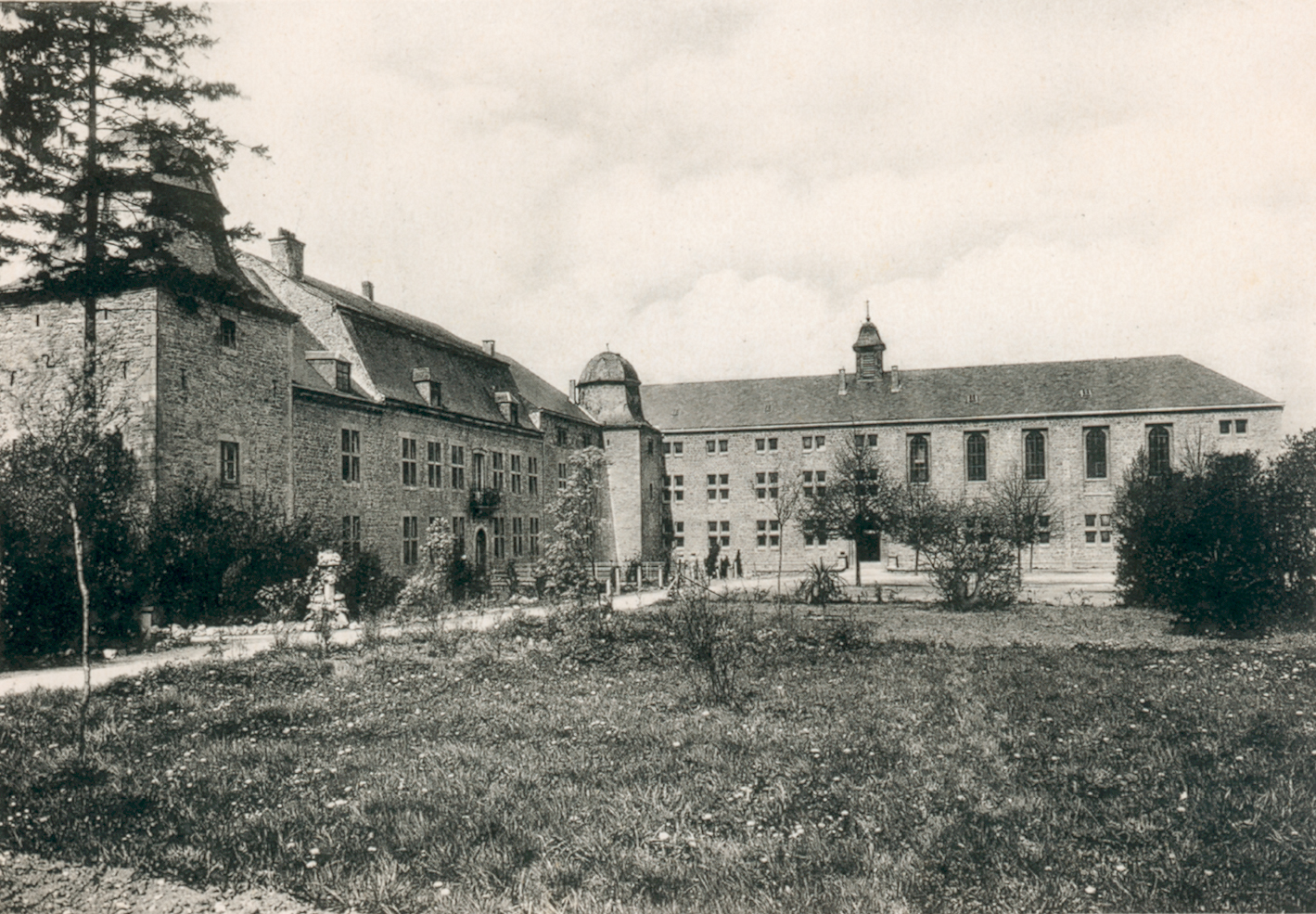 Alumnat Marie-Médiatrice (château de Bure). Extension de 1936 (aile de la chapelle). Archives du Collège d'Alzon.